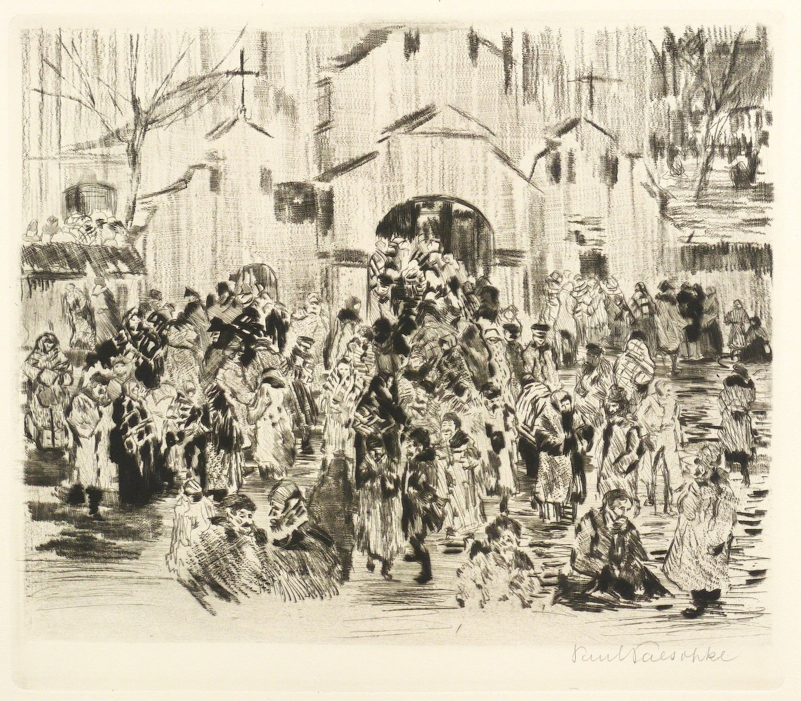 Беларуская (тарашкевіца): Ліда (Lida), вуліца Віленская (vulica Vilenskaja). Фарны касьцёл